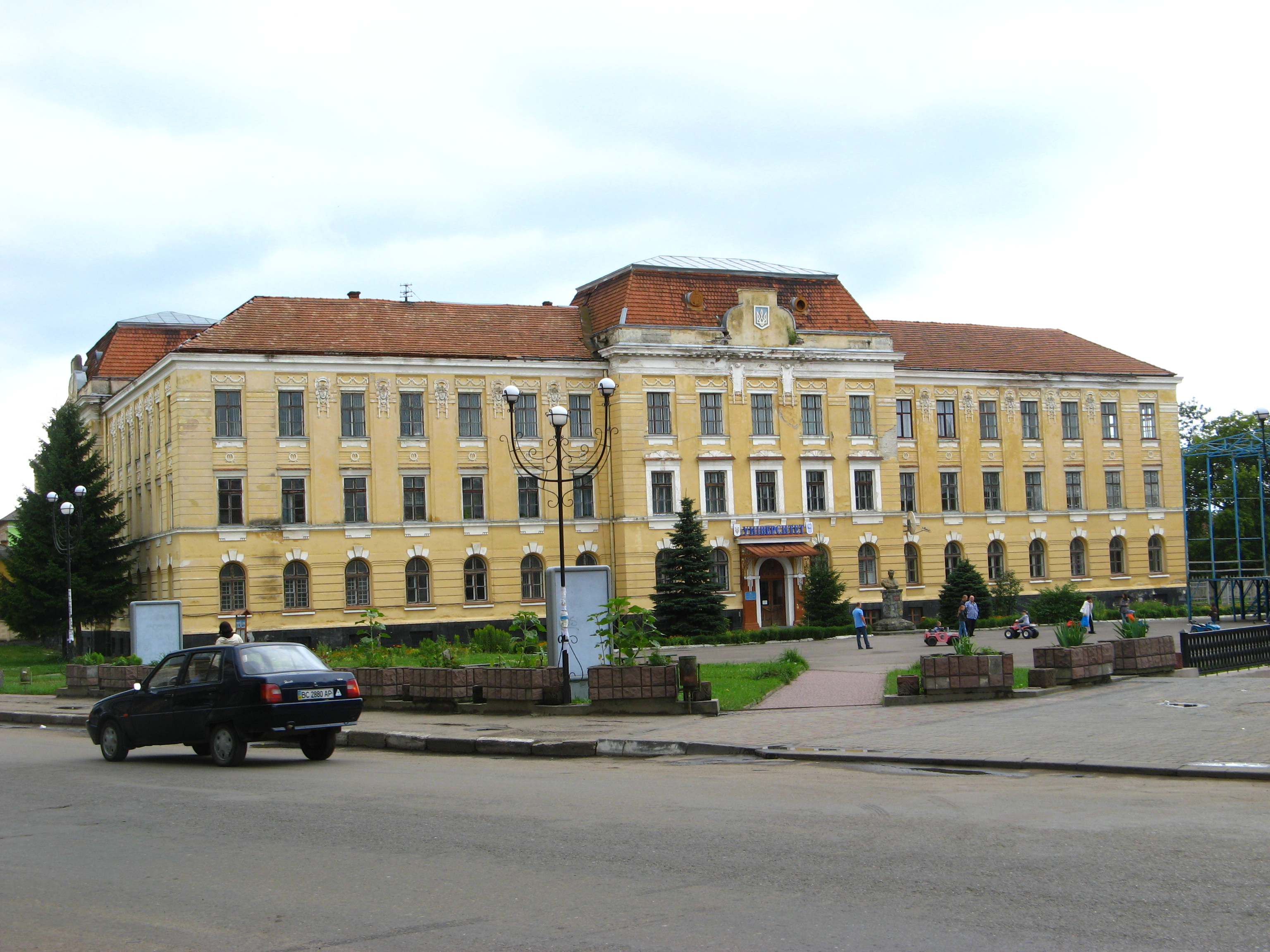 Sambir-8.jpg: Самбір (Львівська обл.)